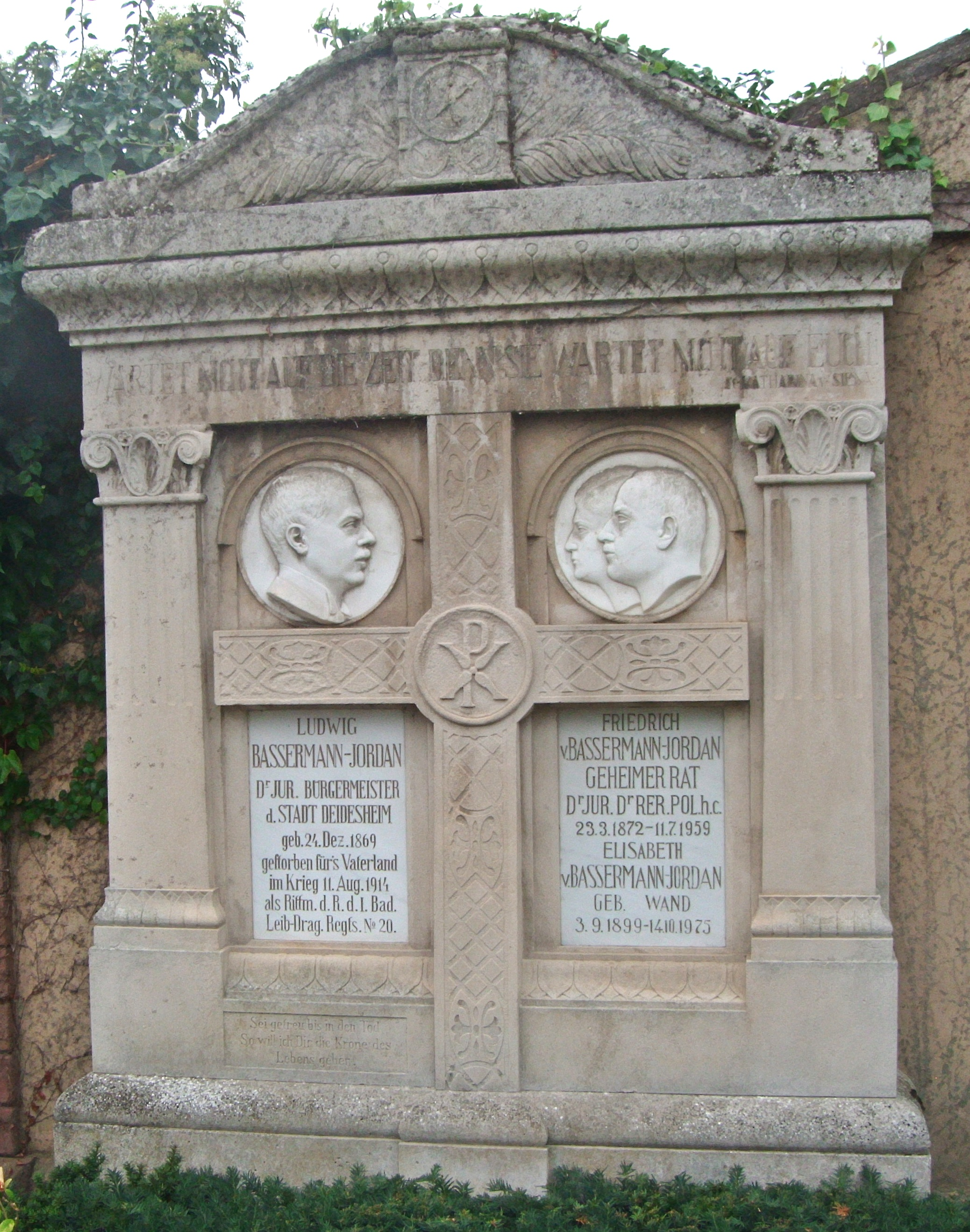 Ludwig Bassermann-Jordan (1869-1914), Weingutsbesitzer und Bürgermeister in Deidesheim, Grabstein, Friedhof Deidesheim